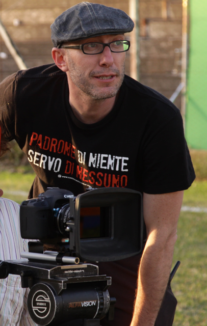 Lorenzo Garzella sul set de "Il Mundial dimenticato"